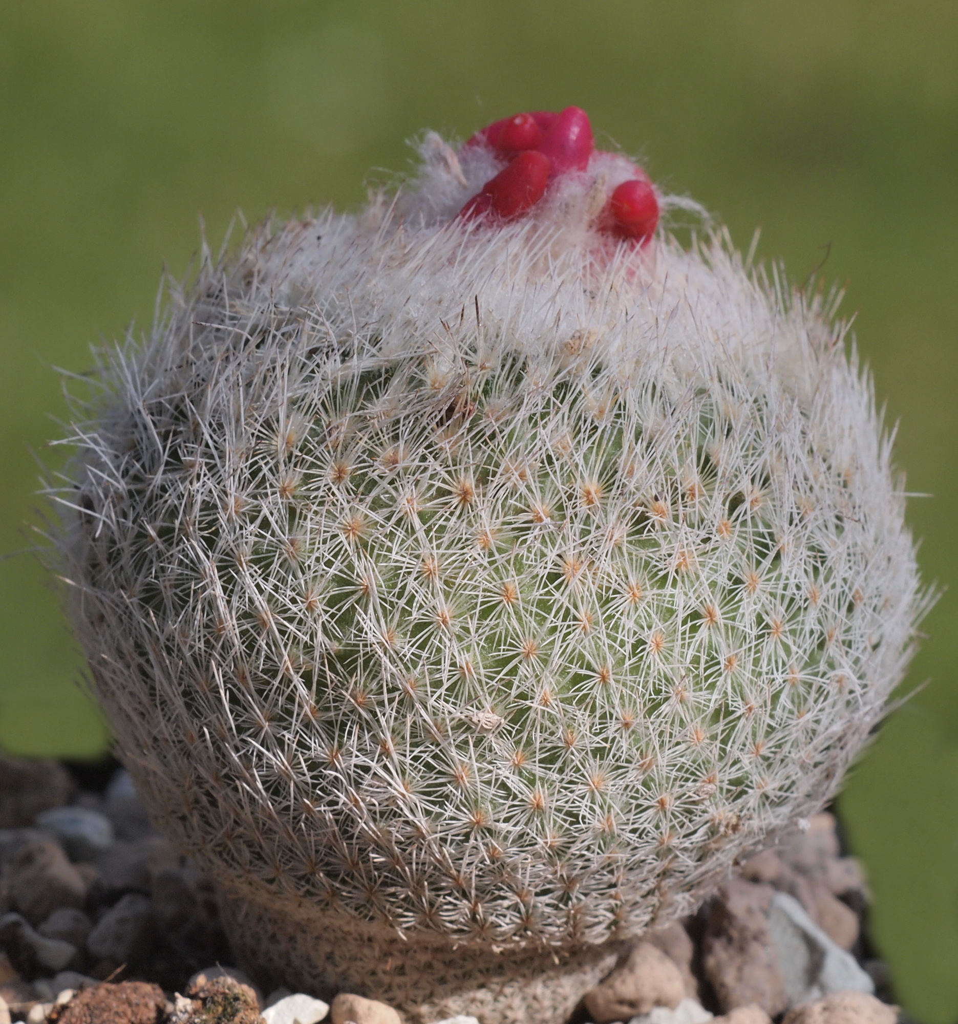 erworben auf der 1. Mecklenburger Kakteenbörse in Rostock/Rövershagen